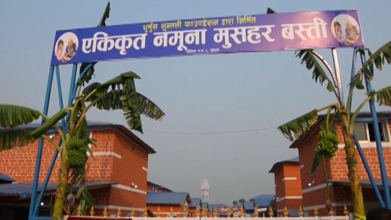 नेपाली: एकीकृत नमूना मुसहर बस्ती